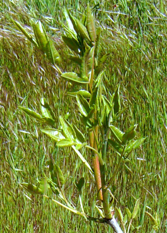 Pistacia vera (Kerman cultivar) sprouting, Castelltallat, Catalonia. 840 m asl